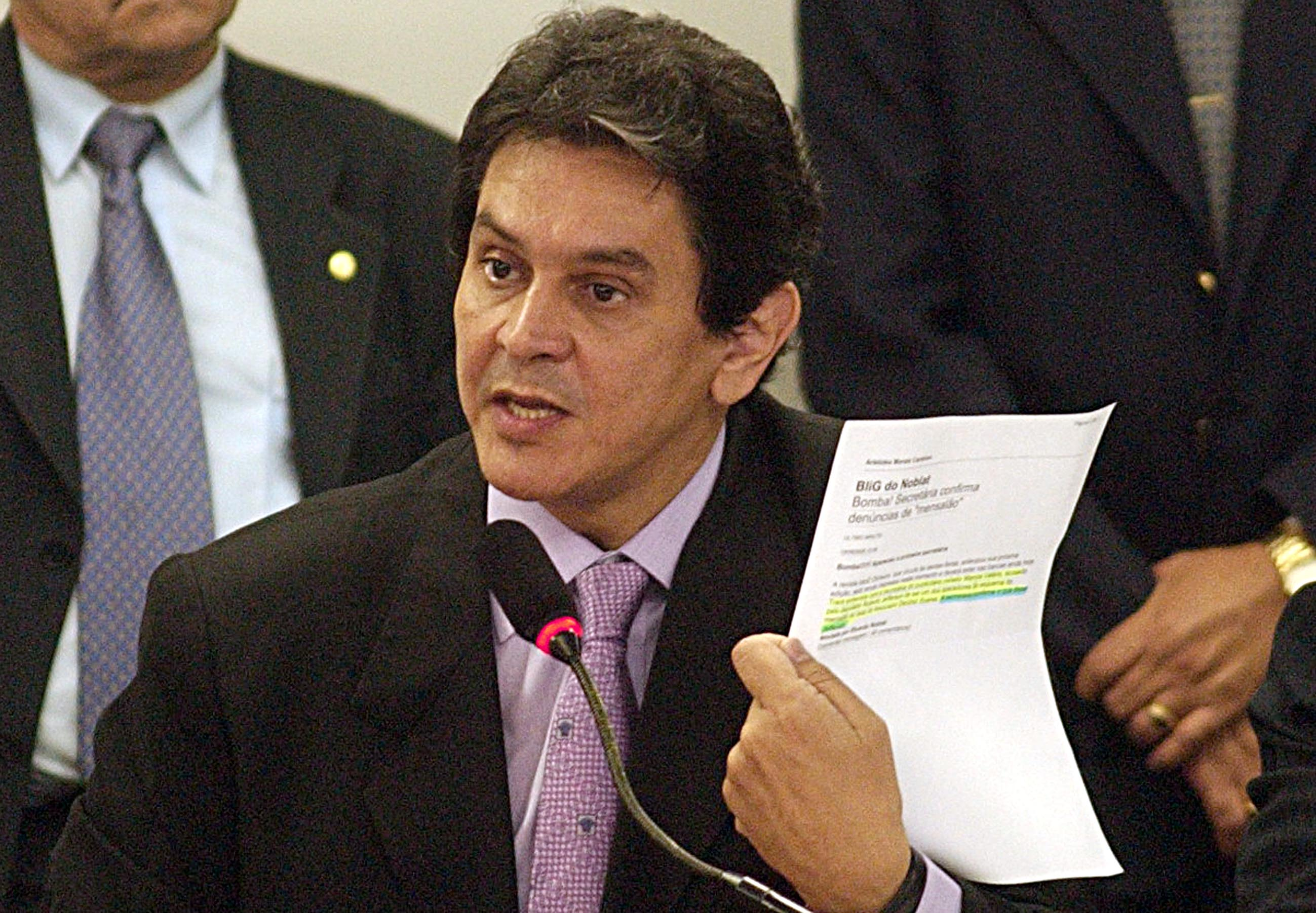 Brasília - O deputado Roberto Jefferson (PTB-RJ), depõe no Conselho de Ética da Câmara dos Deputados. (Foto Marcello Casal Jr./ABr)